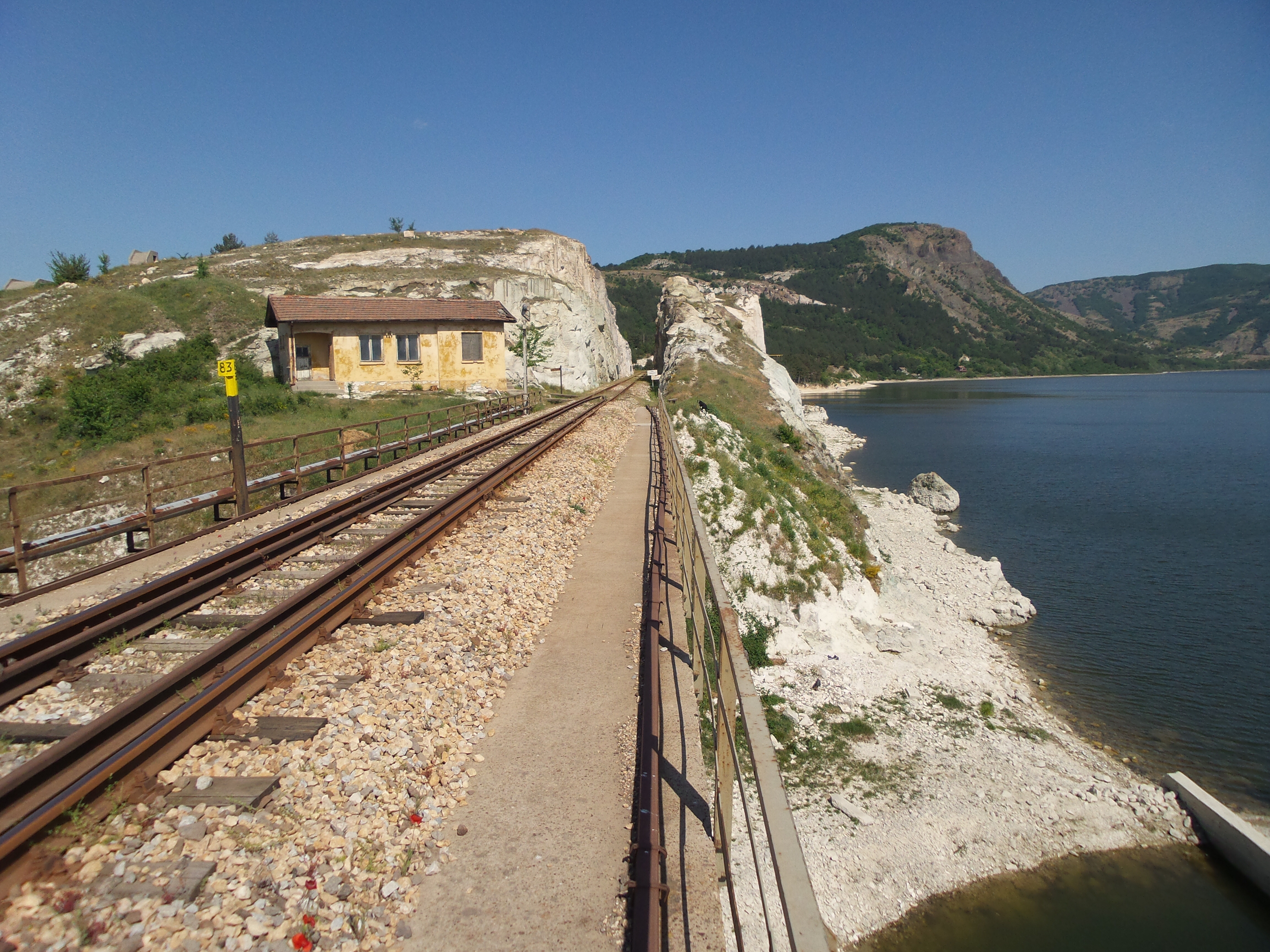 Железопътната линия в участъка между спирка "Желязна врата" и гара Кърджали.